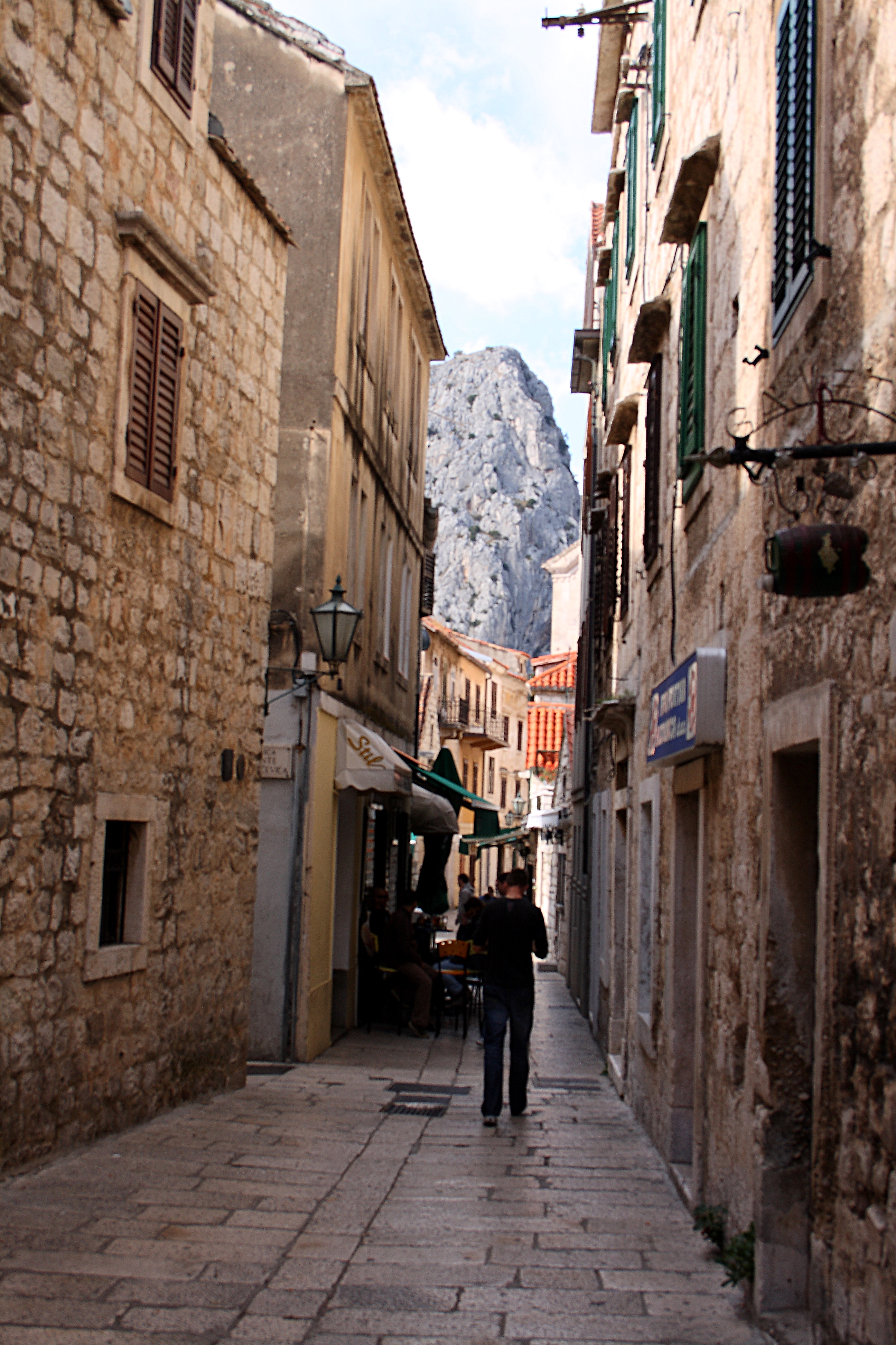 Omis,_Weg_zur_Cetina-Mündung